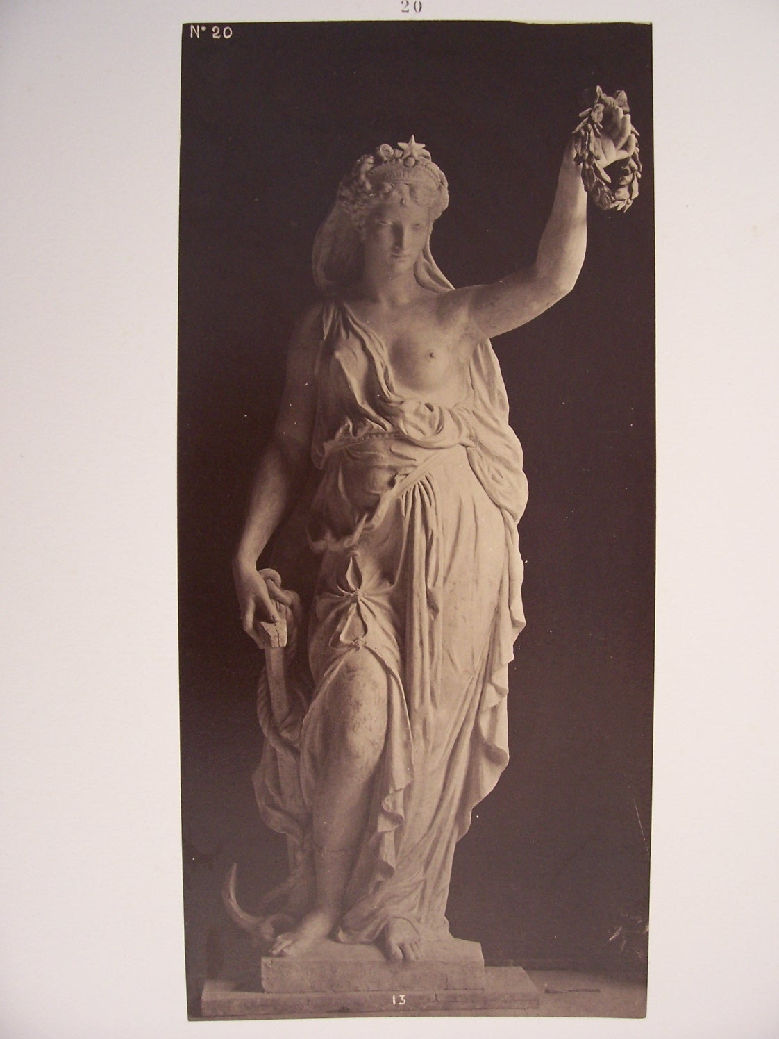 Le Nouvel Opéra de Paris. Statues décoratives (35 planches) Statues dans le Grand Foyer: Planche 20: L'Espérance (par Bruyer)